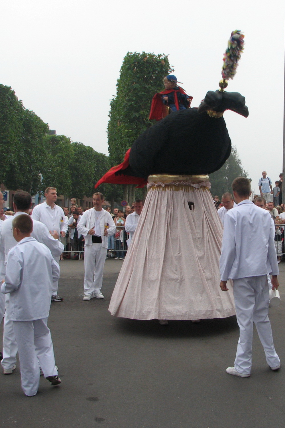 Aigle d'Ath en 2007